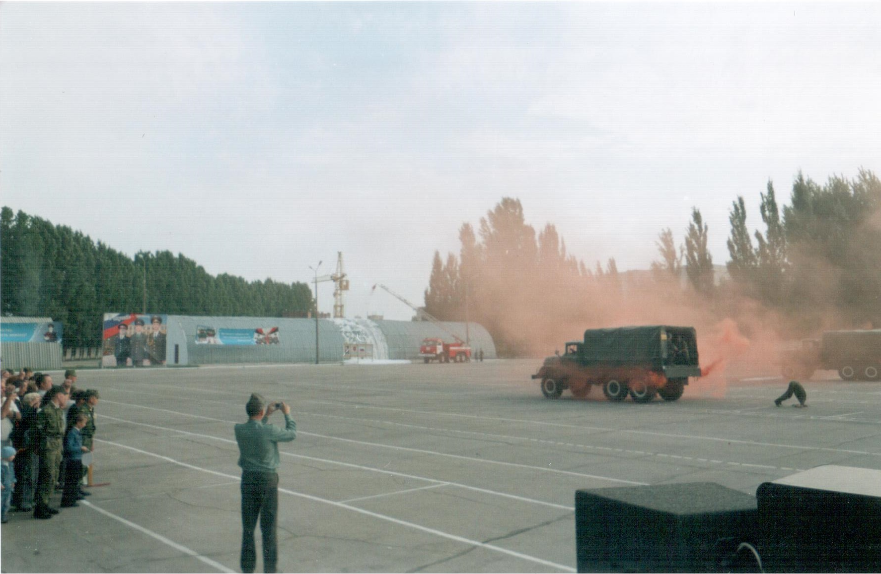 Выступление курсантов,вооружения и техники,в день принятия присяги.